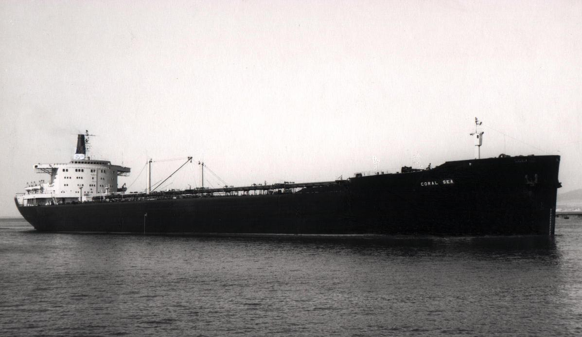 המיכלית "קורל סי" של חברת אל ים